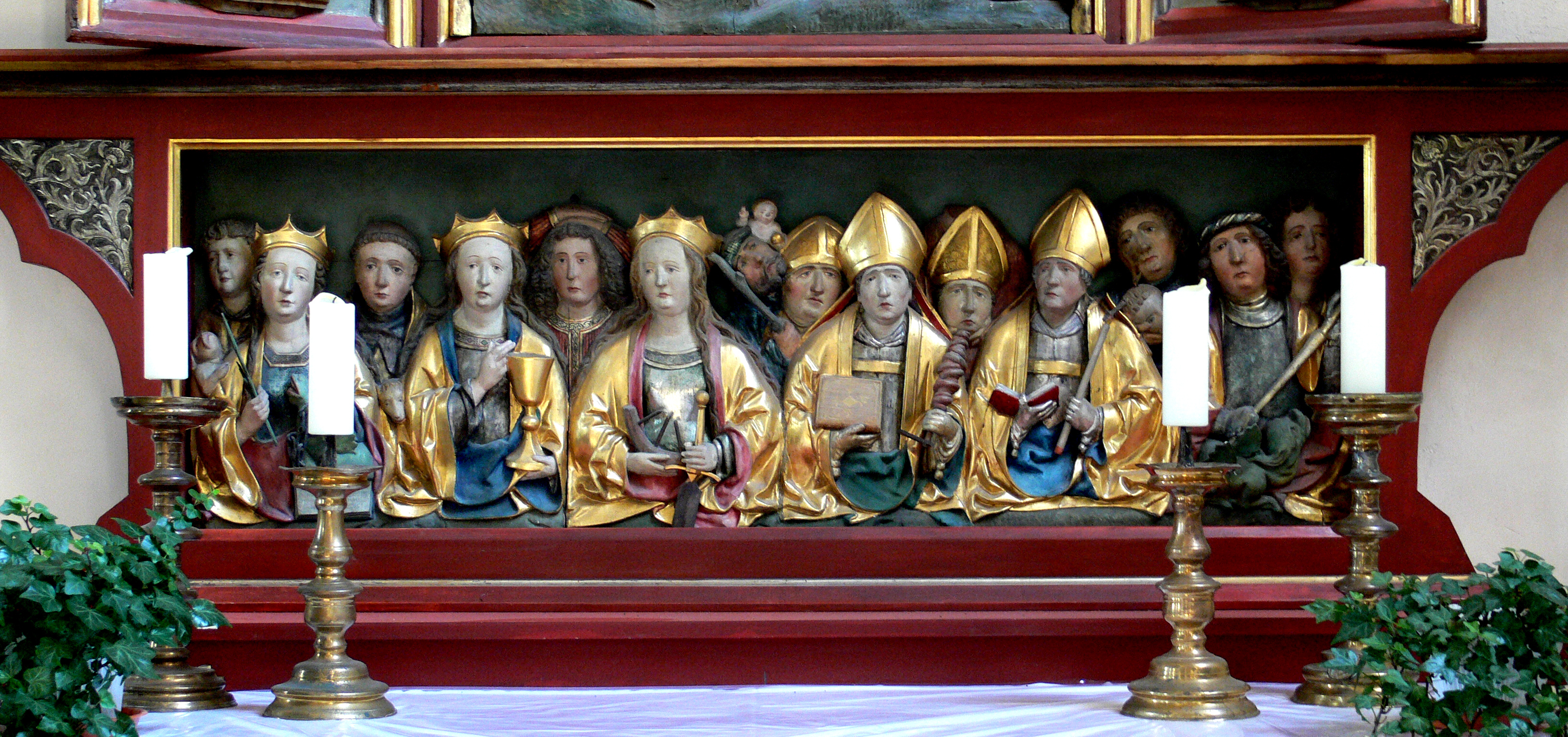 Liebfrauenmünster, Wolframs-Eschenbach, Landkreis Ansbach Kreuzauffindungsaltar; Predella "14 Nothelfer" wohl Nördlingen um 1510